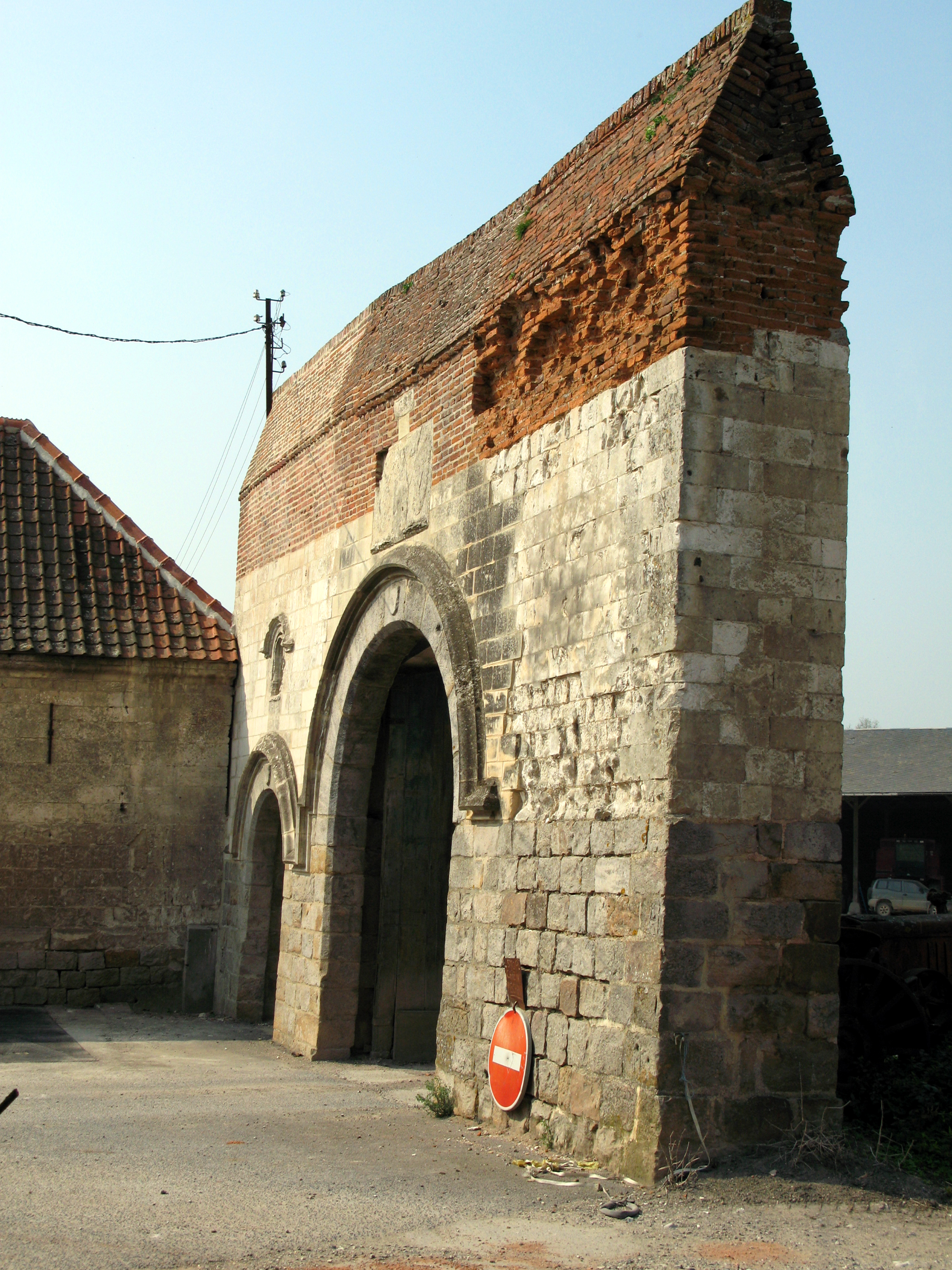 Bertangles (Somme, France)